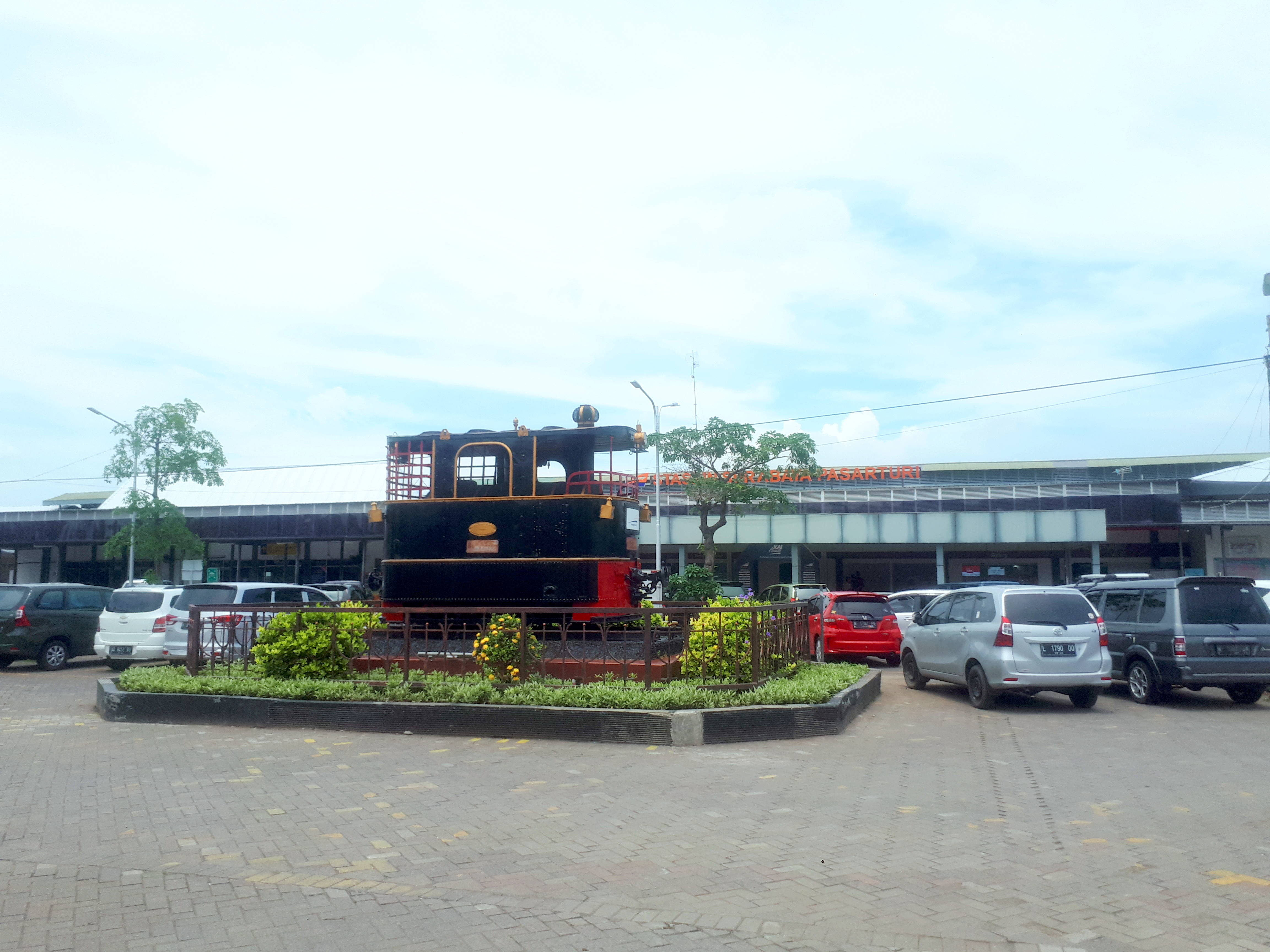 Tampak depan Stasiun Surabaya Pasarturi tahun 2020 dengan monumen lokomotif B1239